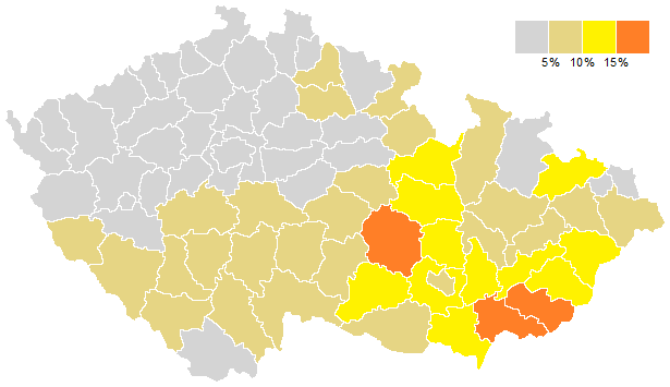 Volební výsledky KDU-ČSL ve volbách do České národní rady v roce 1992 podle okresů